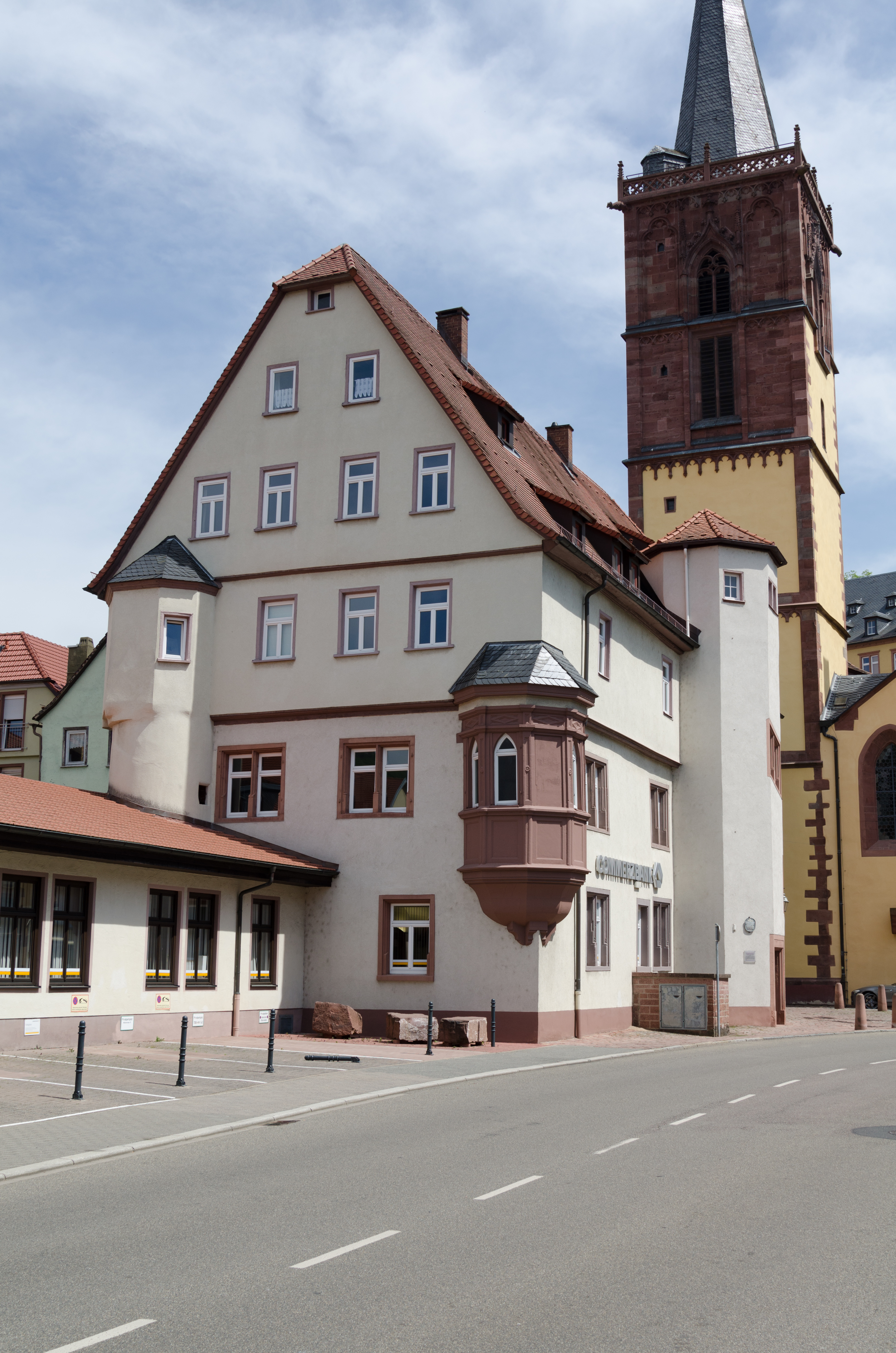 Wertheim, Mühlenstraße 10, 001